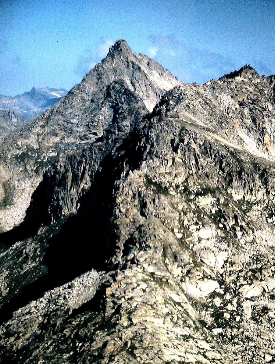 El Pic de Peguera des del pic de la Mainera, a Cabdella. La Torre de Cabdella (Pallars Jussà - Catalunya). Foto presa de la projecció d'una diapositiva.